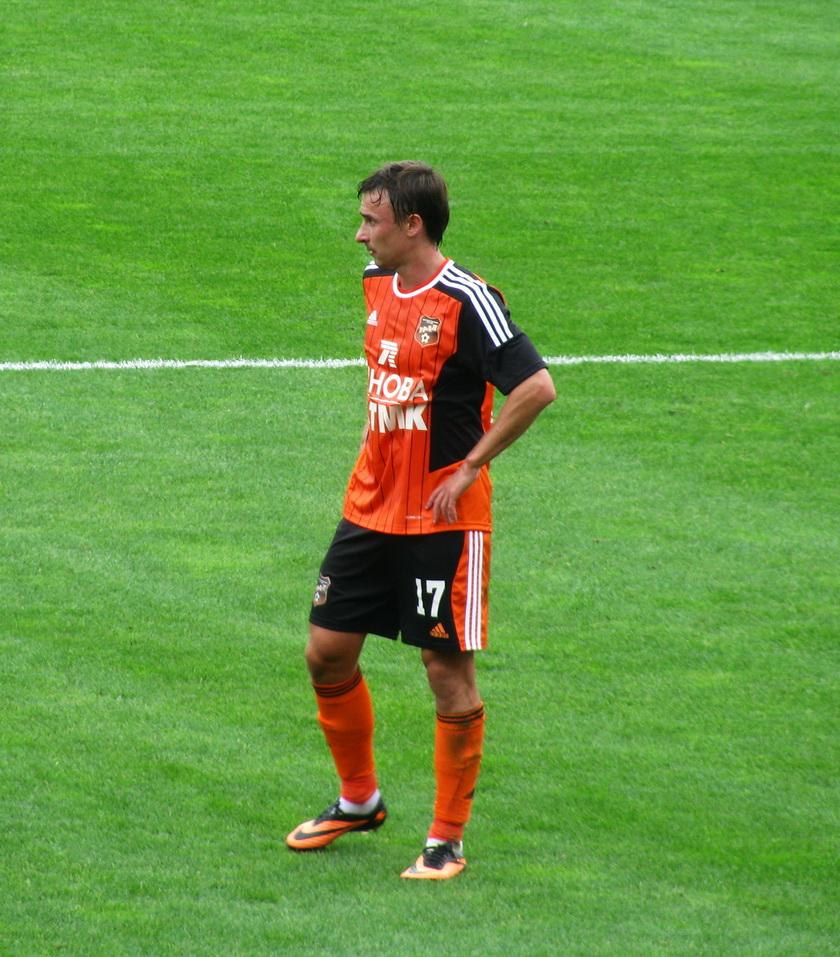 Полузащитник ФК "Урал" Андрей Горбанец в матче против казанского "Рубина" 1 сентября 2013 года.